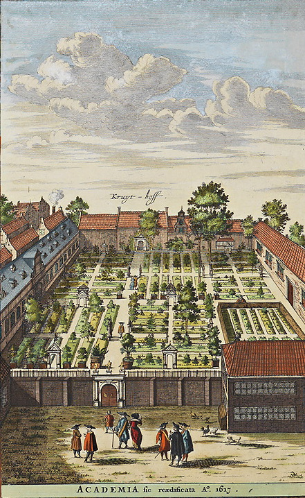 Kruythoff (hortus) van Leiden uit het Stedenboek van Frederick de Wit.